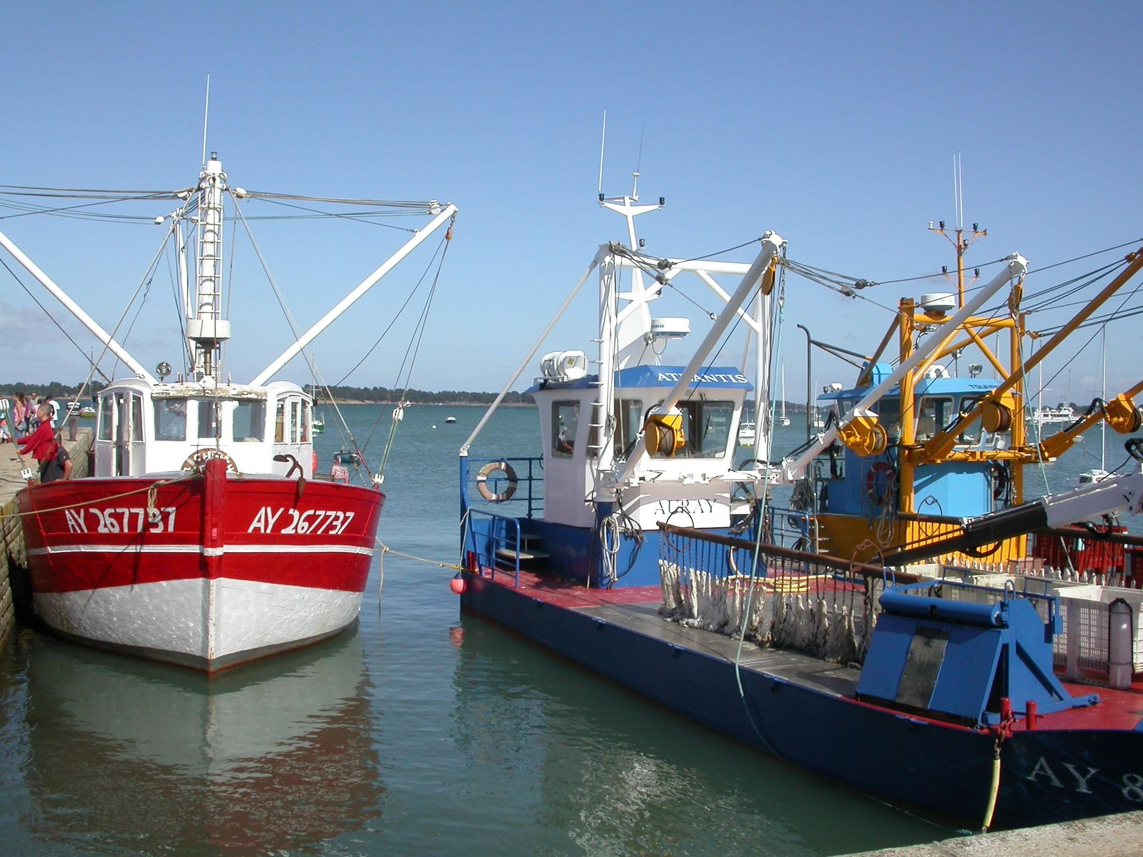 Ponton et bateau ostréicole